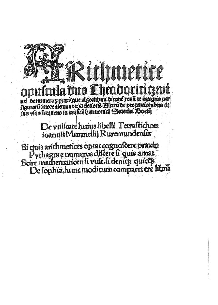 Arithmetice opuscula duo Theodorici Tzwiuel de numeror[um] praxi (que algorithmi dicunt[ur])vnu[m] de integris per figuraru[m] (more alemanor[um] deletione[m]. Alteru[m] de proportionibus cuius vsus frequens in musica[m] harmonica[m] Seuerini Boetij. - [Köln : s.n.], 1507 (... Quod et publica[m] ob vtilitatem in magistrali artis impressorie taberna ingenuorum liberorum Quentell iterato disseminari procurauit). - [10] c. ; 4º. - VD16 T 2432 e 2434. - Segn.: A6 B4. - Esemplare mutilo dell'ultima c. .